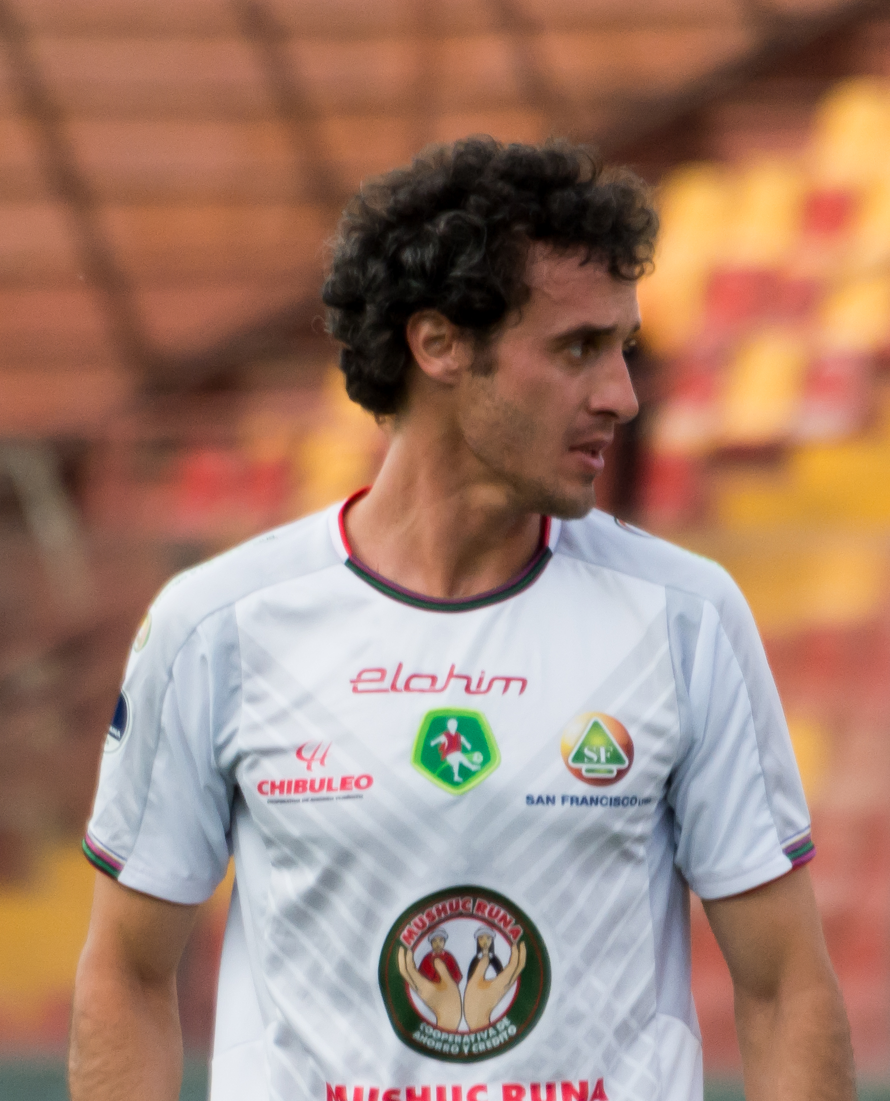 Horacio Orzán, Unión Española v Mushuc Runa, Estadio Santa Laura, Independencia, Santiago, Región Metropolitana, Chile.